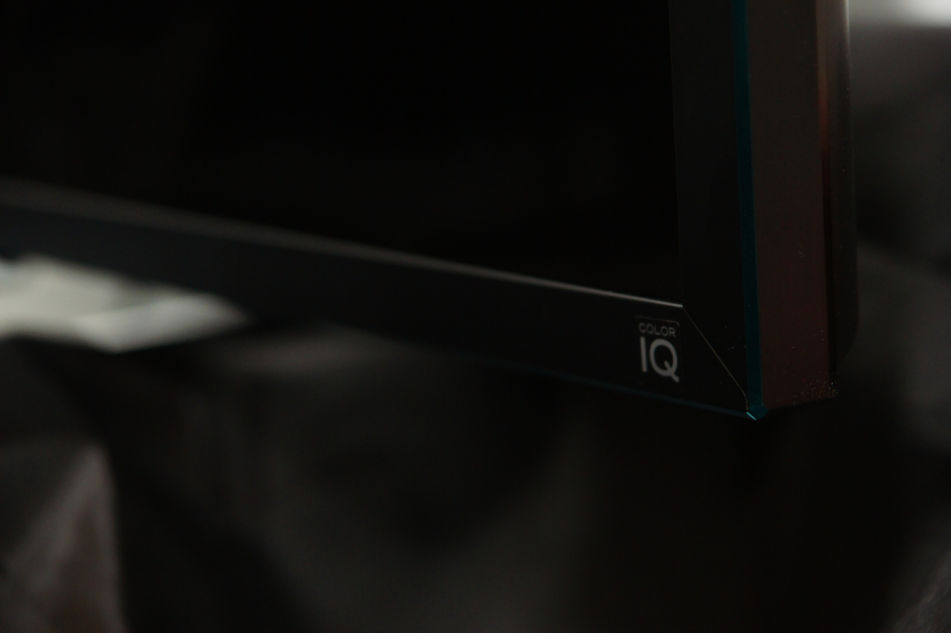 Bravia W9 Zimny